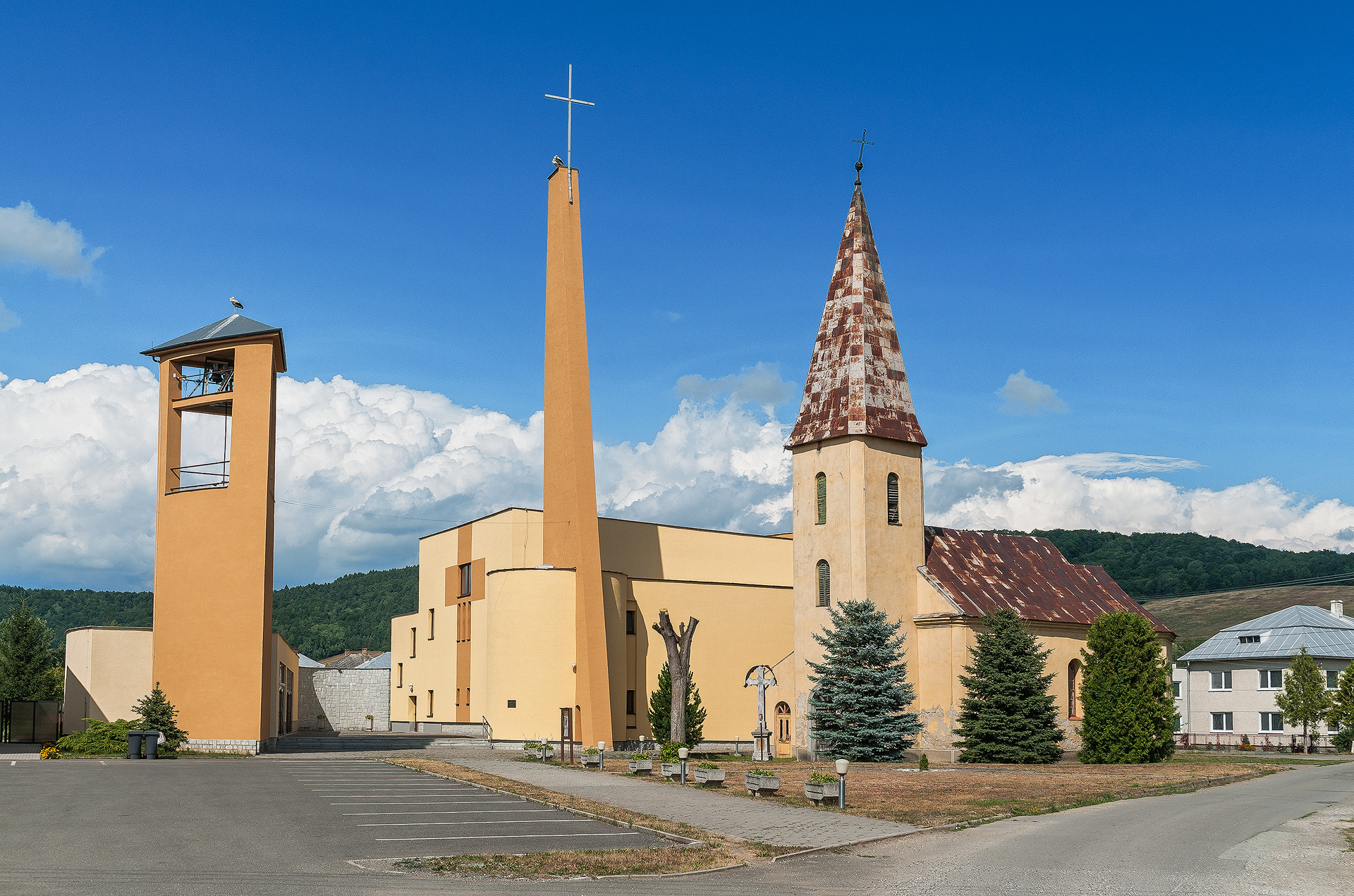 Kostel v Ľubiši, okres Humenné.